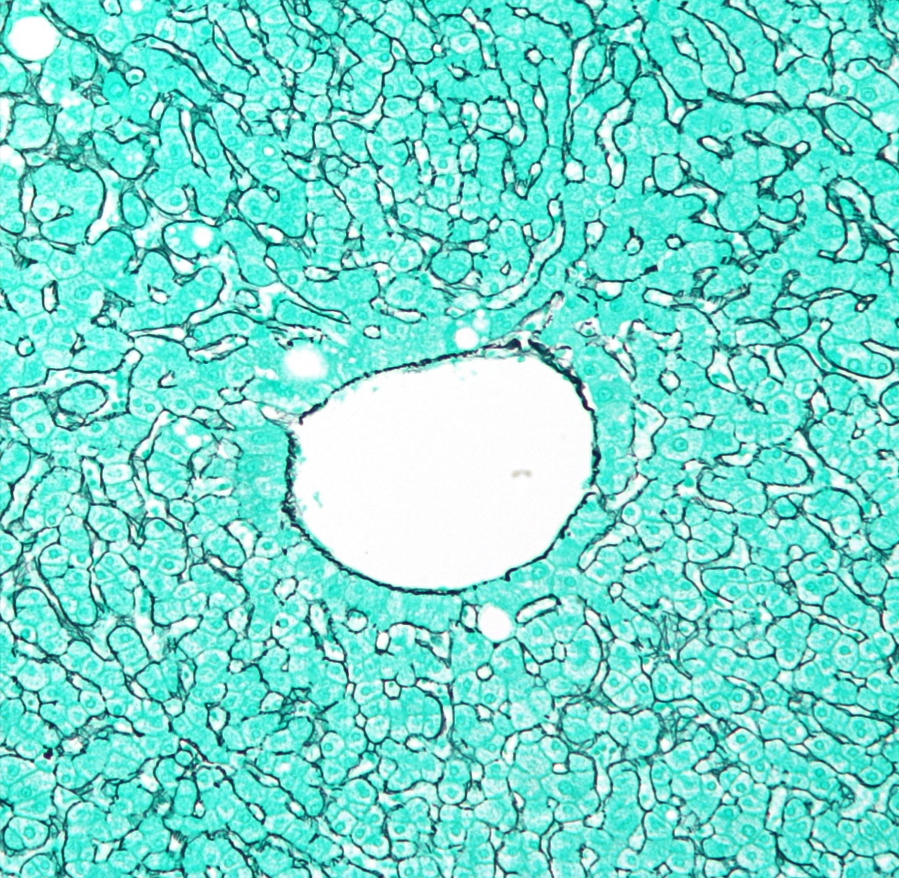 Vena centro-lobulillar. Vena centro-lobulillar vacía, cortada transversal en el centro (en blanco), rodeada por delgadas fibras de reticulina. Fibras de Reticulina (en negro). Hepatocitos con citoplasma (en verde).